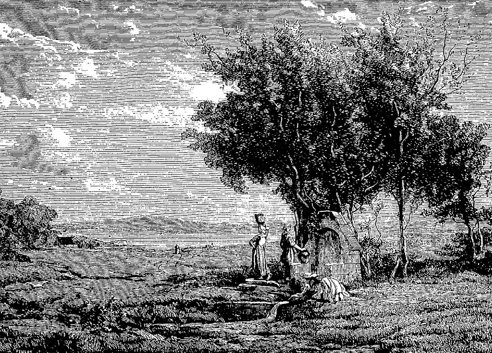 Plougastel-Daoulas : femmes à la fontaine Saint-Jean (dessin d'après un tableau d'Emmanuel Lansyer, exposition des Beaux-Arts de 1867, paru dans" La Semaine des Familles")